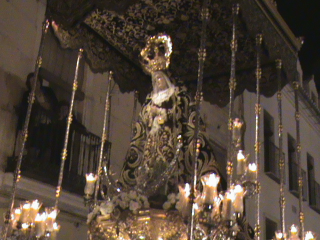 Virgen de los Dolores de Antequera